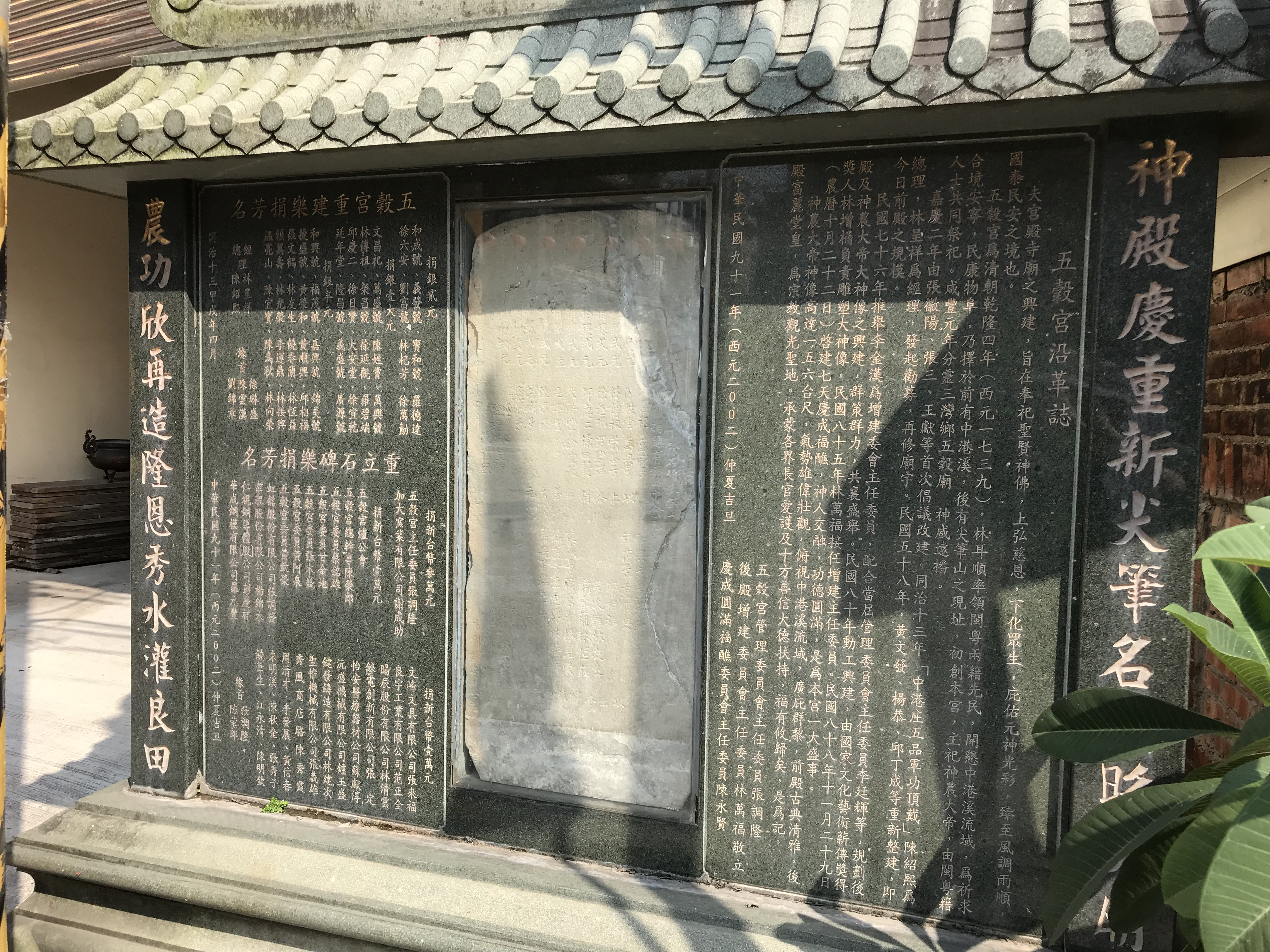 竹南五穀宮石碑亭